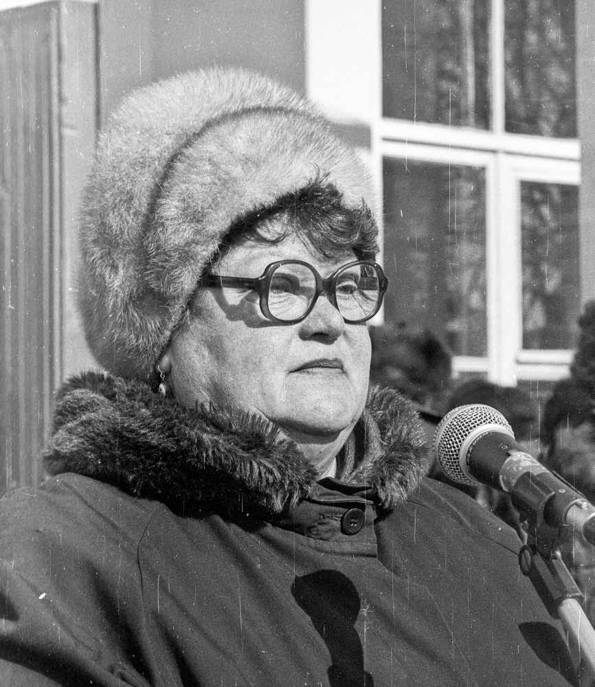 27 марта 1997 года на Народной площади состоялся митинг жителей города Переславля в рамках Всероссийской акции протеста профсоюзов «За труд, зарплату и социальные гарантии». Выступающие на митинге ораторы требовали от президента и правительства всенародно признать свою недееспособность, уйти с политической арены и таким образом частично искупить вину перед народом. Были выдвинуты претензии в адрес местного самоуправления, которое не ремонтирует больницу и подъезды, не приводит в порядок дороги, не борется с хулиганством, оставляет без поддержки учителей. На митинге была принята резолюция с резкими требованиями трудящихся. — Выступает Ирина Борисовна Радек (председатель Переславль-Залесского городского профсоюза работников культуры, бывшая директор кинотеатра «Восток»).